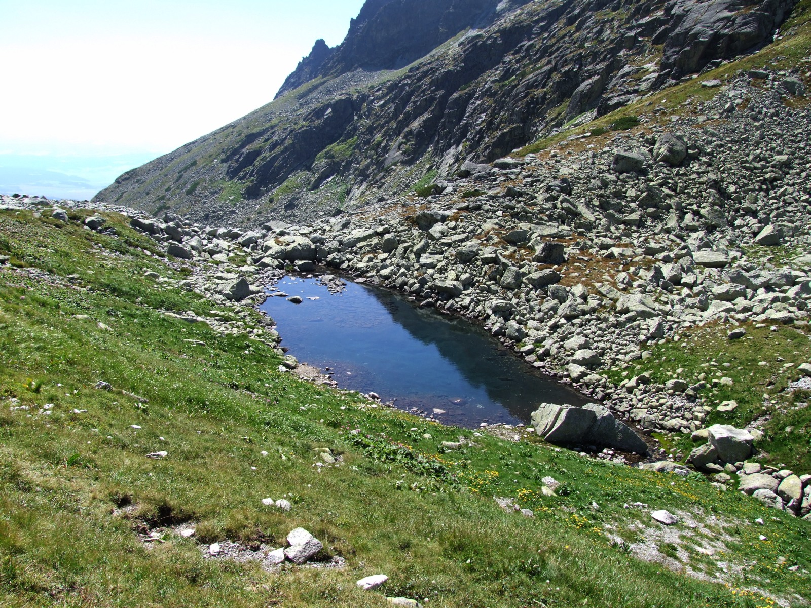 Dolina Młynicka (Tatry Wysokie). Wołowy Stawek